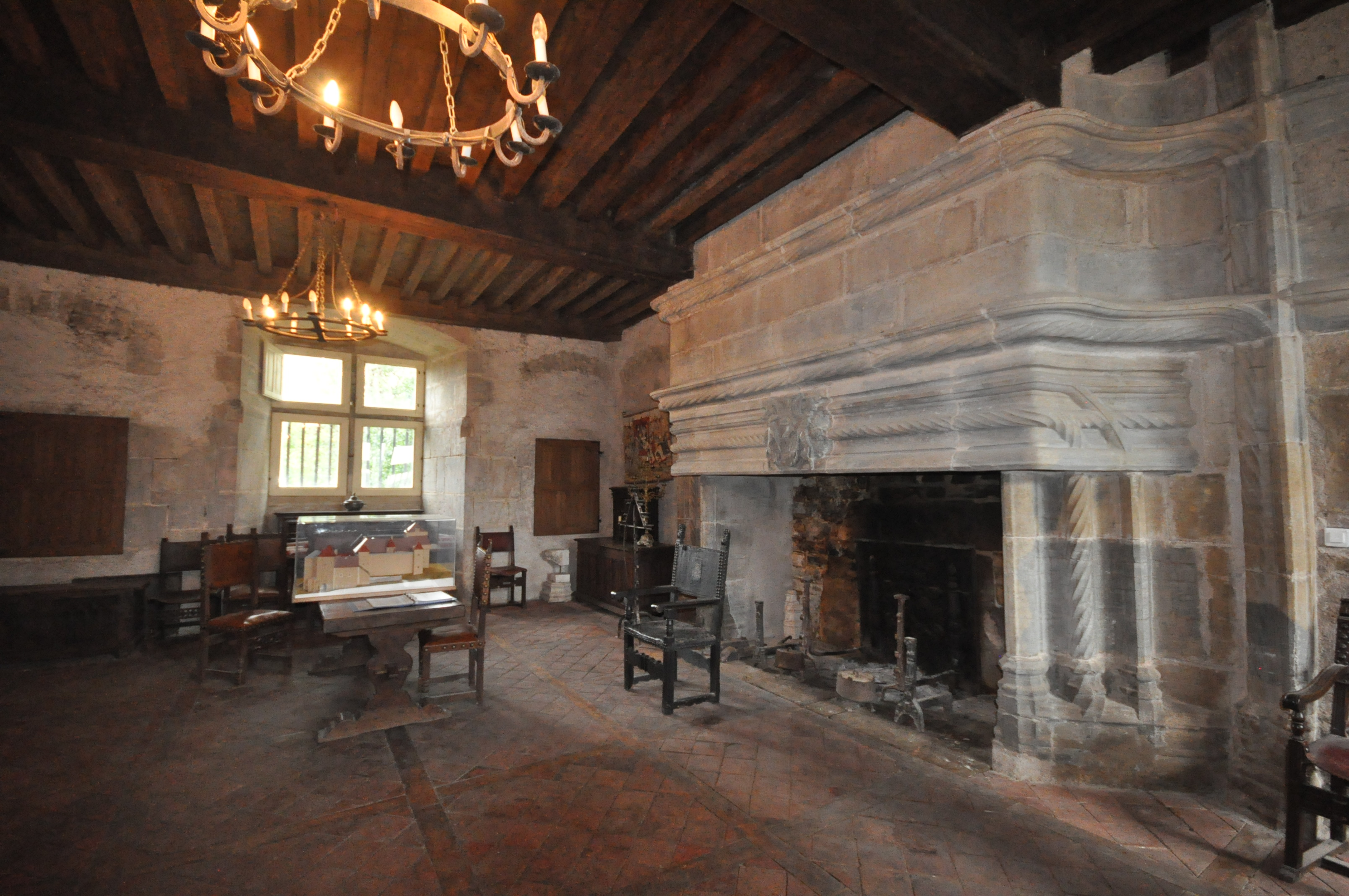 Château de Vallerois-le-Bois (Classé) .